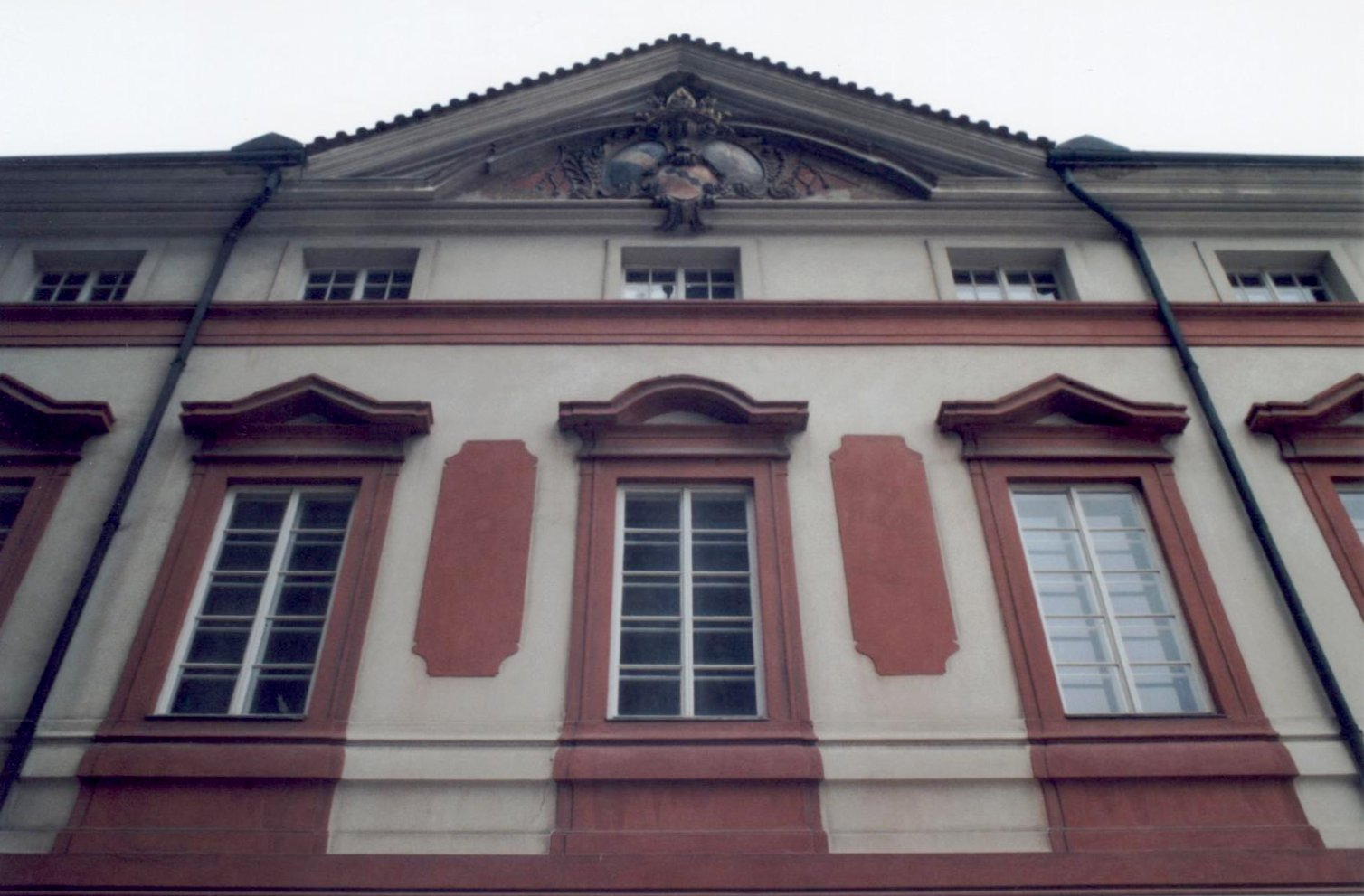 Kapitulní děkanství na Pražském Hradě, architekt Jan Santini 1706